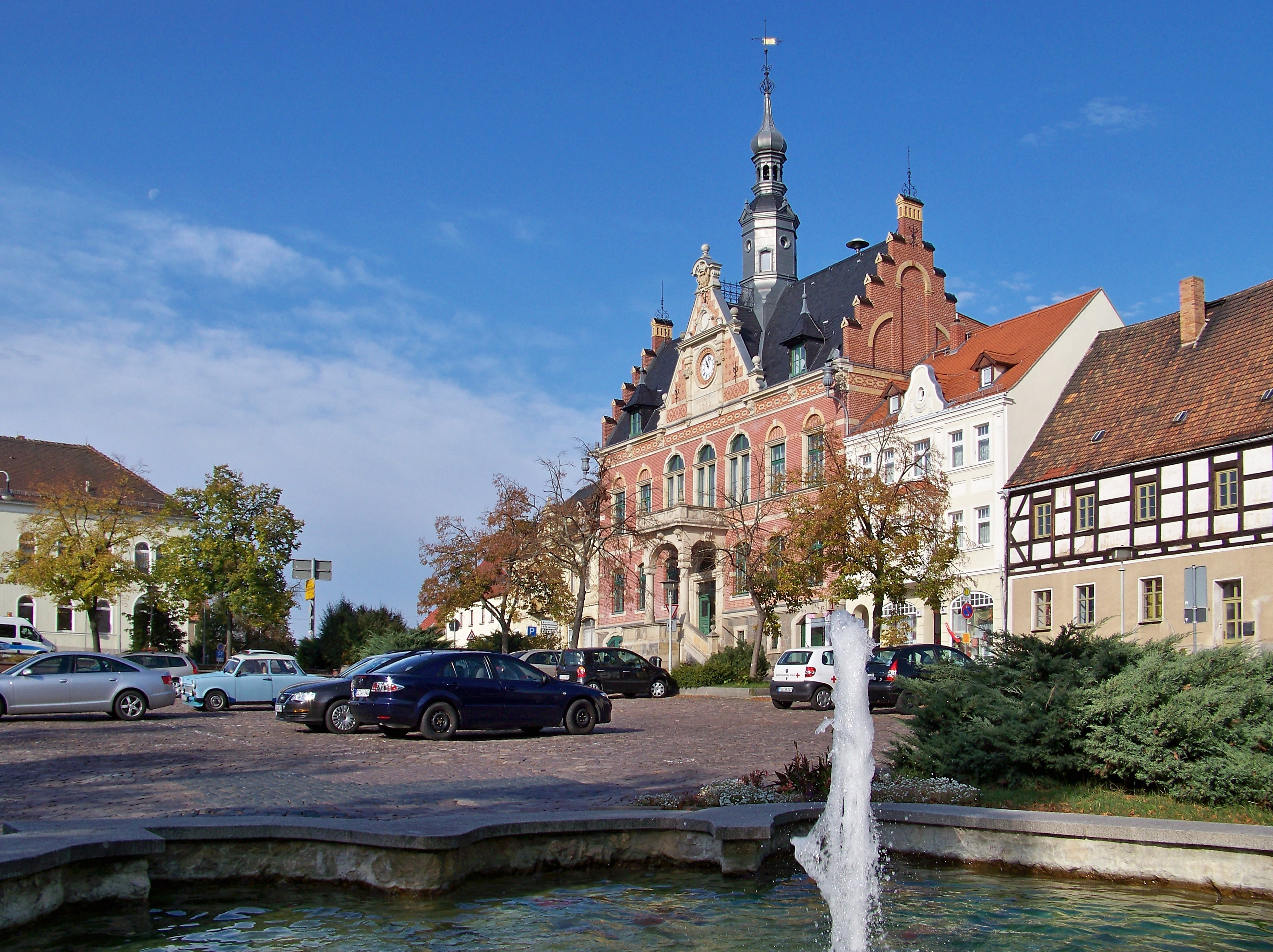 Marktplatz in Dahlen/Sachsen mit dem Rathaus (* 1888)